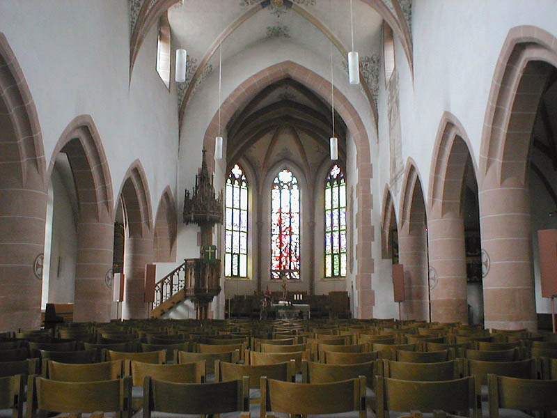 Blick durch das Hauptschiff zum Altar der Stadtkirche in Murrhardt